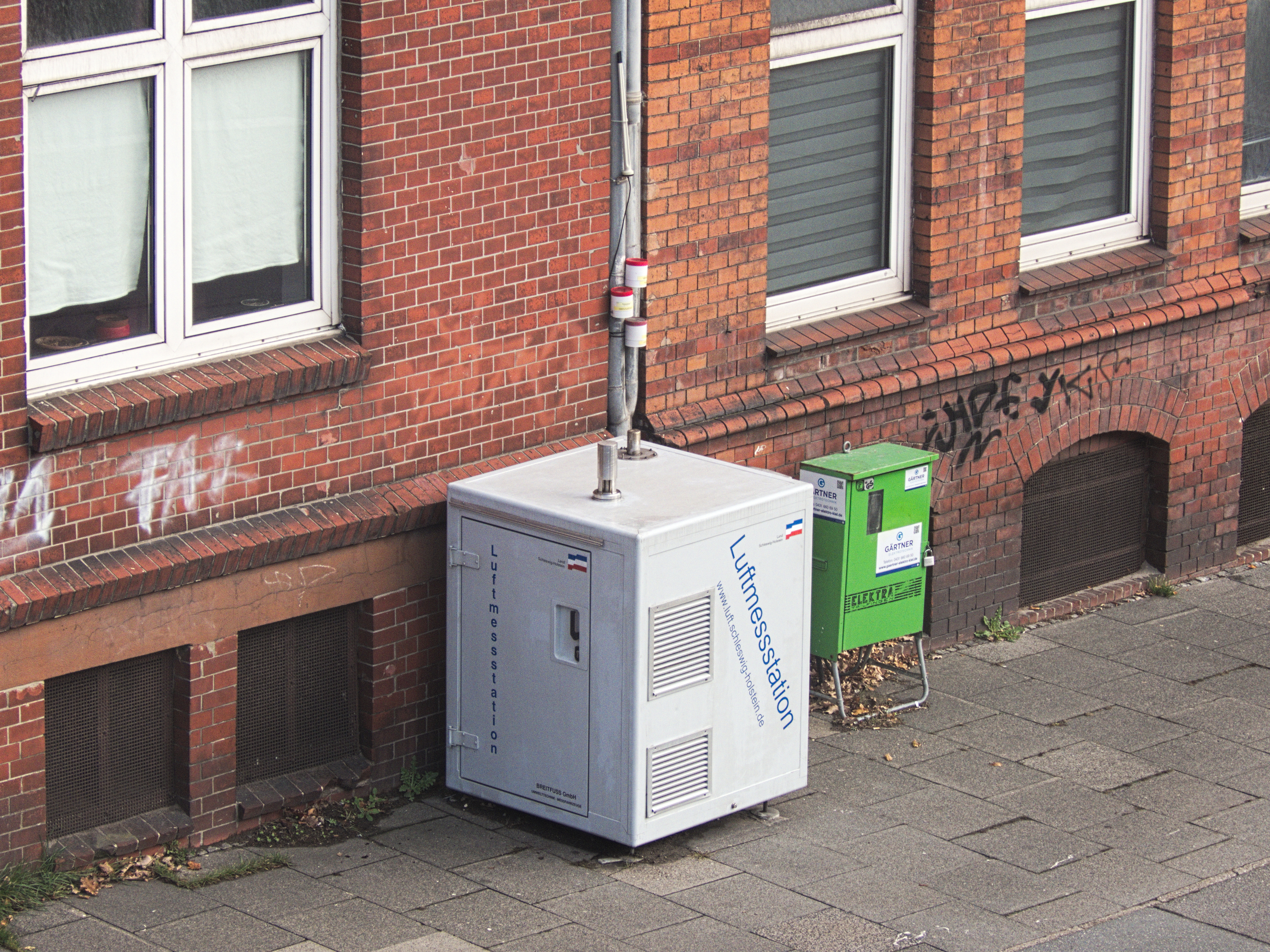 Blick auf die Luftmessstation am Theodor-Heuss-Ring in Kiel.